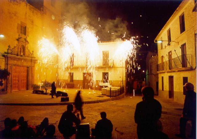 Pirotécnia en Tales